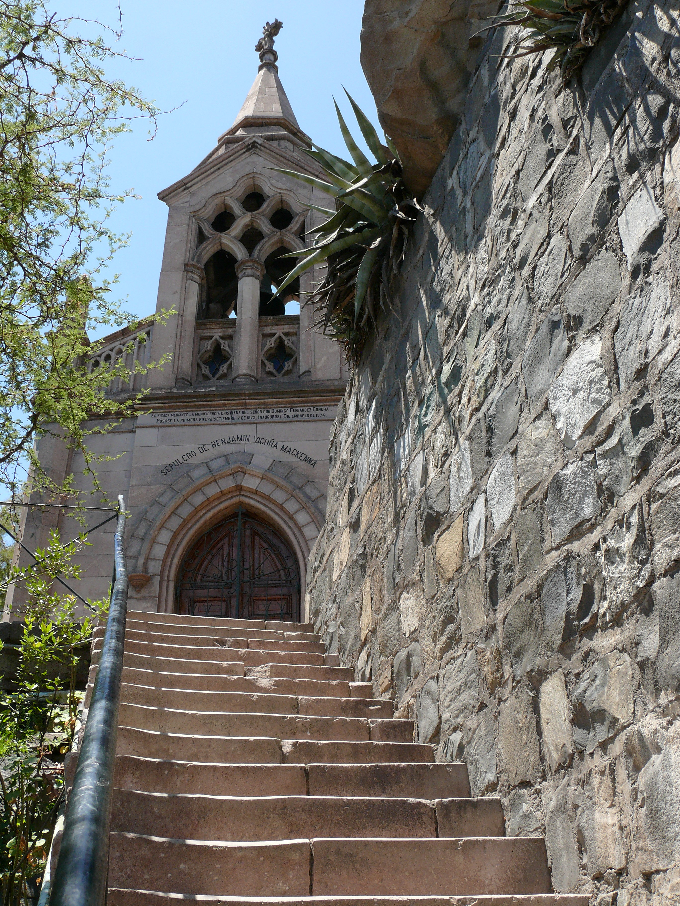 Sepulcro de Vicuña Mackenna en el Cerro Santa Lucía This is a photo of a national monument in Chile: 226